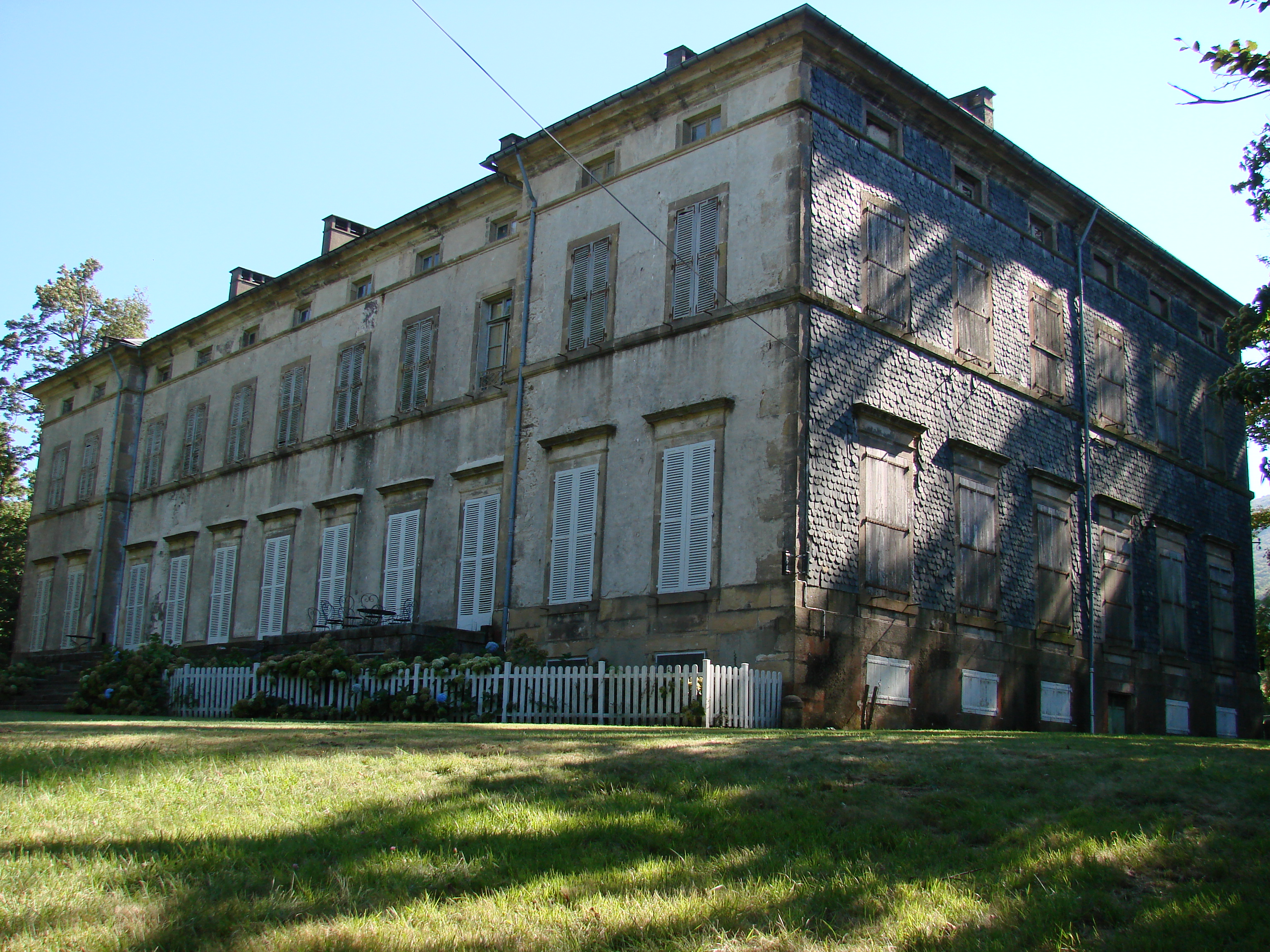 This building is en partie classé, en partie inscrit au titre des Monuments Historiques. .